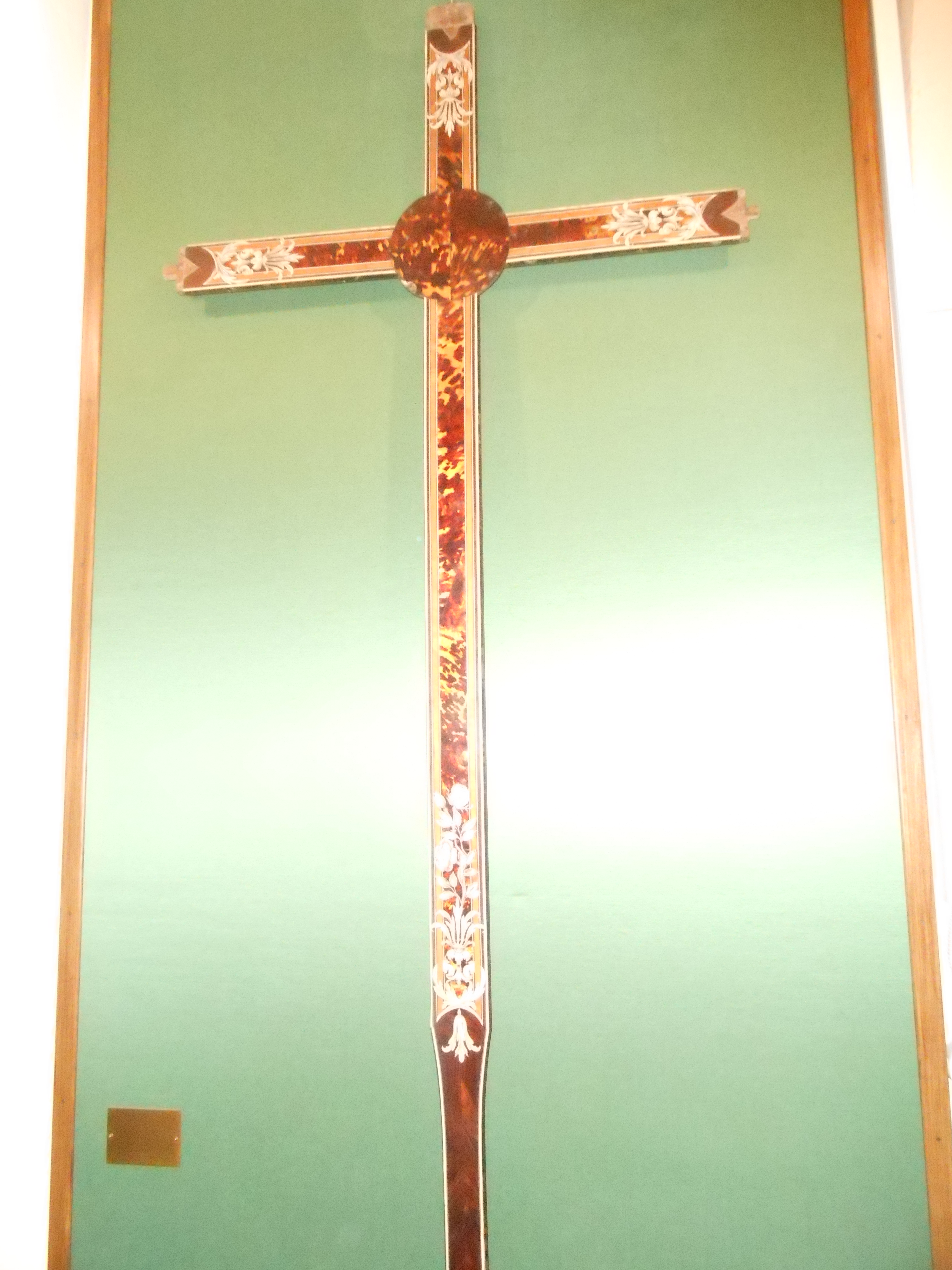 Crocefisso dell'ebanista torinese Pietro Piffetti